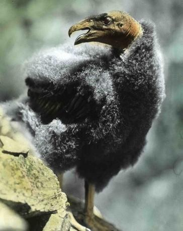 Foto tomada de la página web de la Librería Nacional Digital del U.S. Fish & Wildlife Service